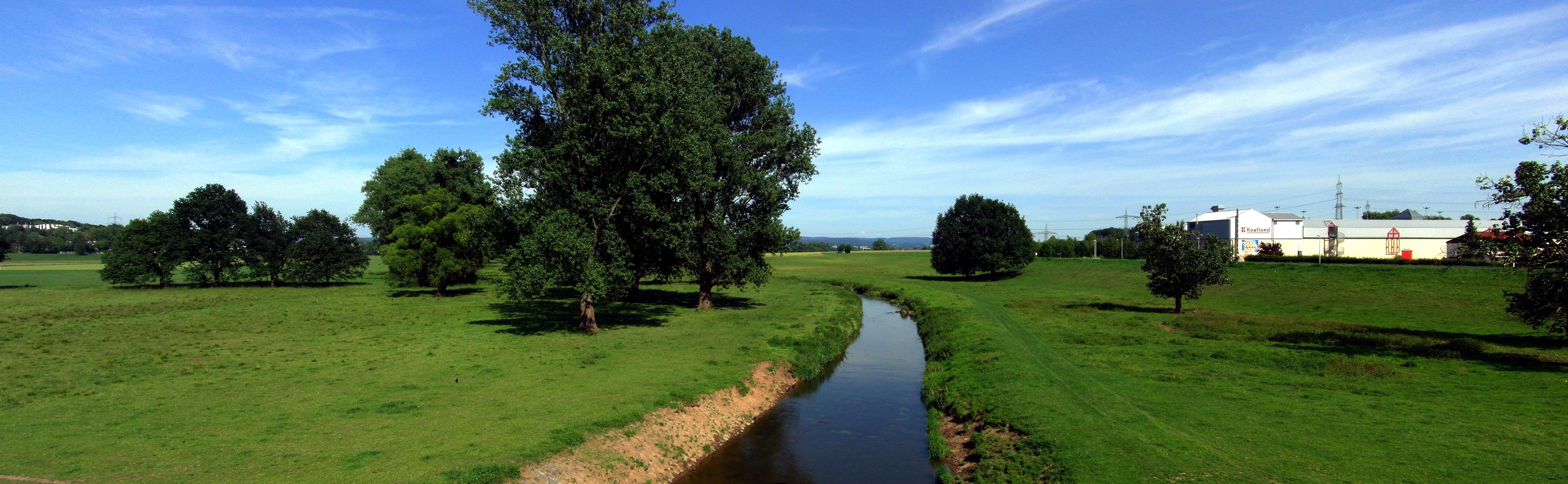 Panorama der Schwalm bei Schwalmstadt am Hochwaserrückhaltebecken Hinweis: erstellt mit der Freeware Hugin 2010